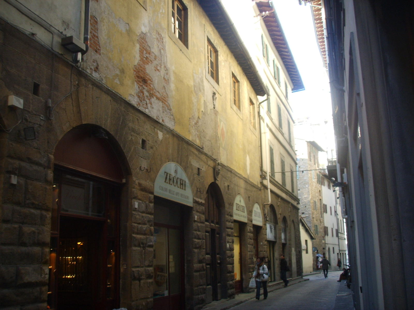 Portale_Via_dello_studio, Studio fiorentino